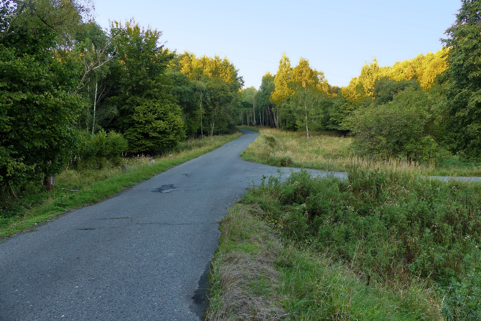 Cesta bývalým Židlovem, odbočka do bývalé Horní Krupé